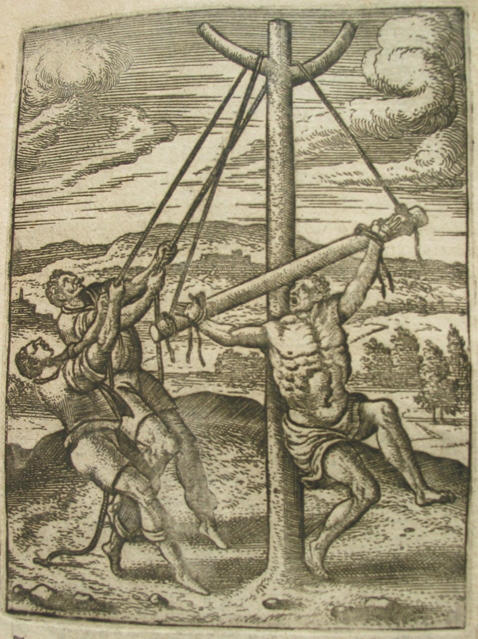 Gravure représentant une mise en croix à l'aide de cordages